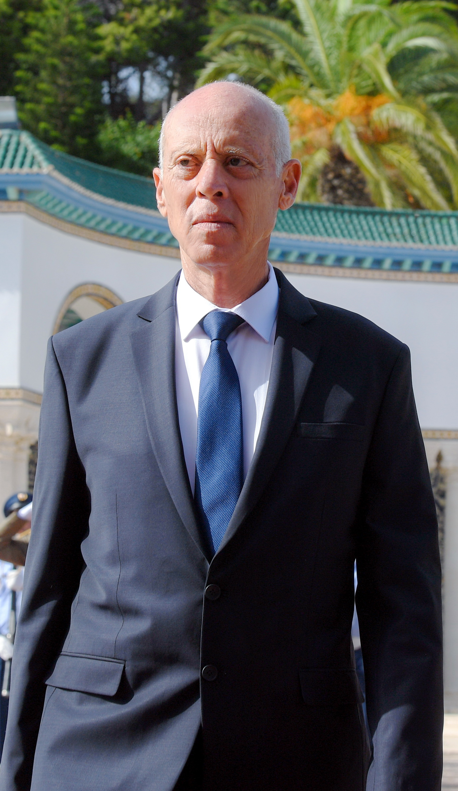 A son arrivé au palais de Carthage